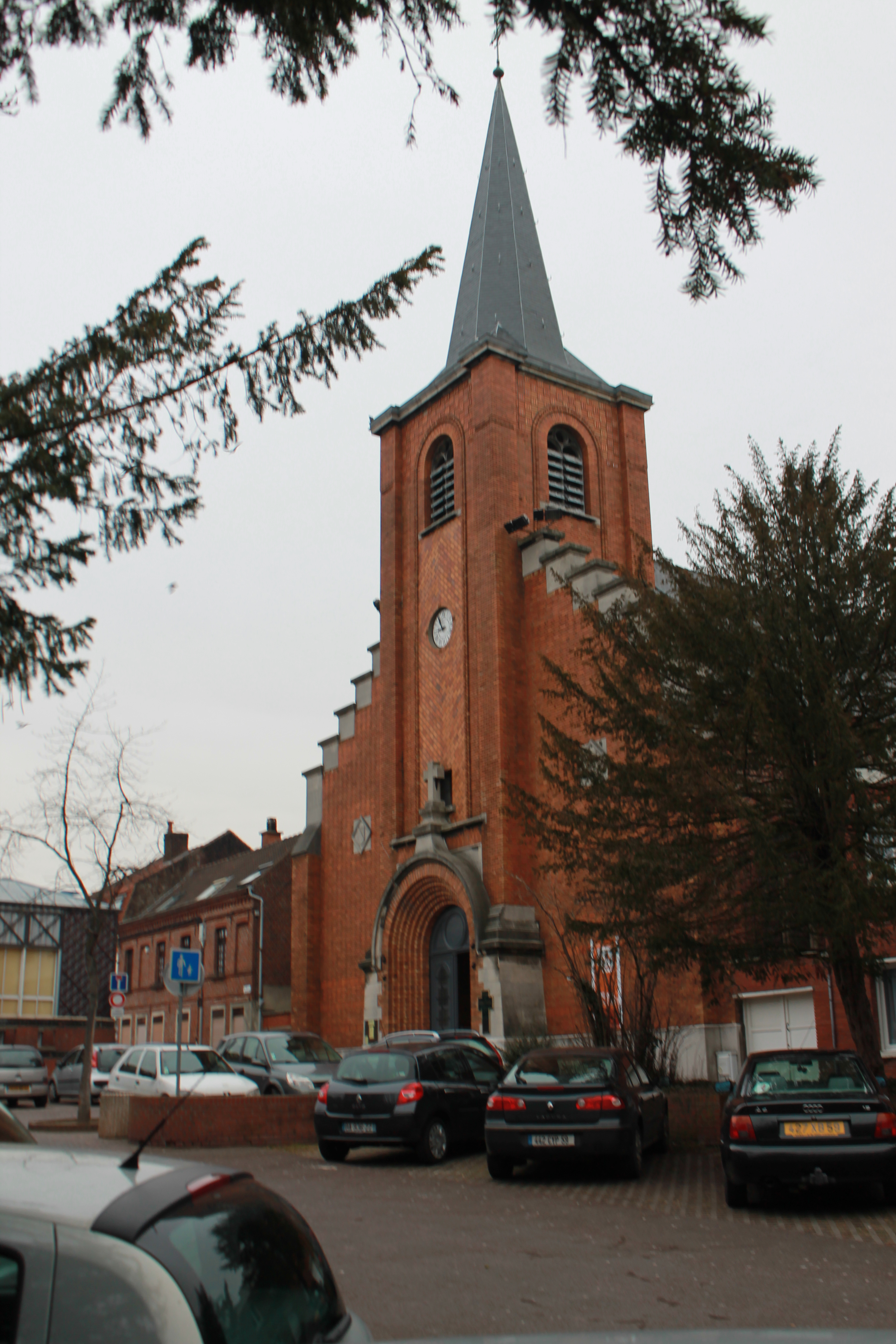 Eglise construite en 1844, elle est situé dans le quartier du "Haut de Mons" à Mons-en Baroeul.